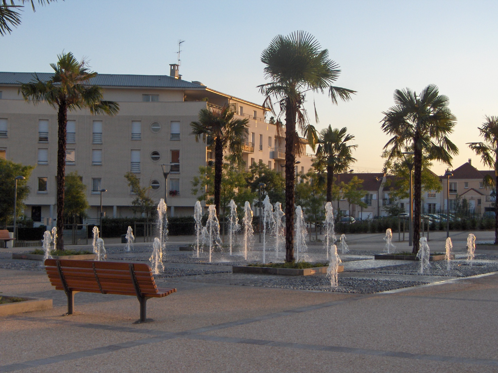 Quartier Vilmorin à Massy (Essonne) Contents 1 Summary 1.1 Auteur 1.2 Description technique 1.3 Source 1.4 Statut 2 Licensing 3 Original upload log Summary Fontaine ludique du nouveau quartier Vilmorin de Massy (Essonne). Auteur Photographie effectuée par Â©Ã©rÃ©ales KilleÂ® âŒ¨ â˜º - 8 septembre 2004 Ã 18 h 53 Description technique Photographie prise avec un appareil numérique vpnHP Photosmart R707 5,1 MPx. f/3,9, 1/333 s, ISO 100 Source Archives personnelles. Statut César Alexanian